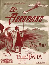 Tapa de la partitura del vals El aeroplano de Pedro Datta publicado en 1913